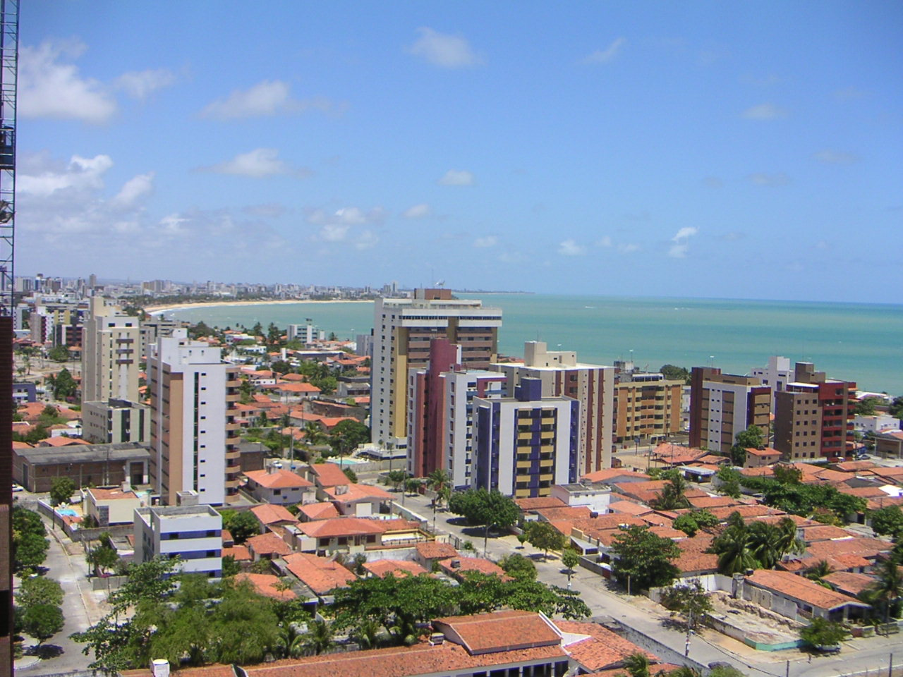 João Pessoa (Paraíba), Brazil. View of Manaíra beach.